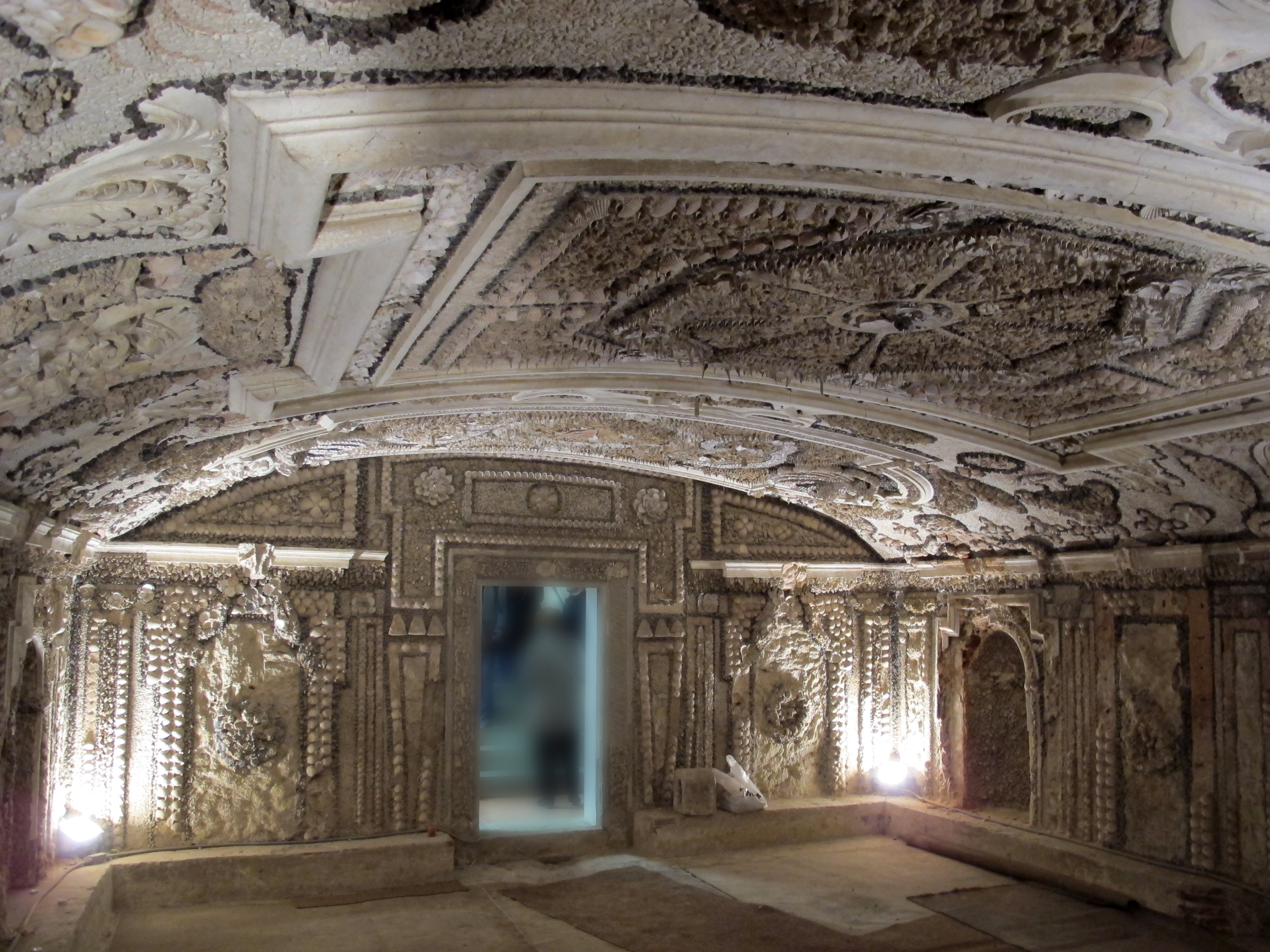 Palazzo Venturi Ginori